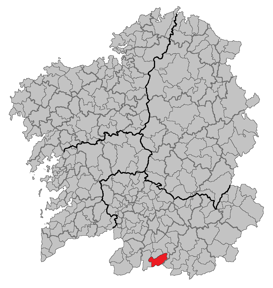 Mapa coa localización do concello de Baltar.